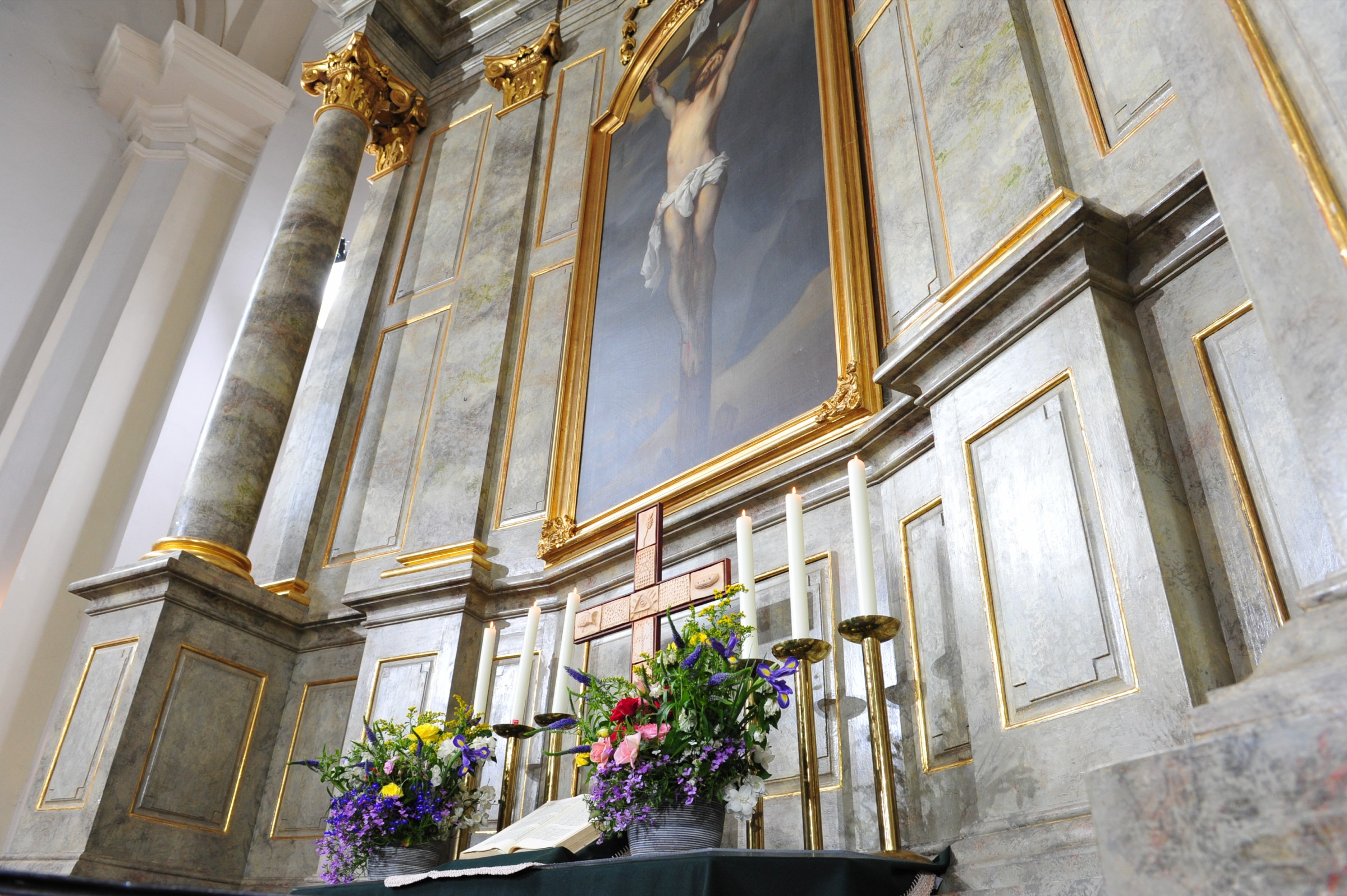 Schönes Licht liegt auf dem Altar. Der Lichtmeister versteht sein Fach - wie alle beim ORF.